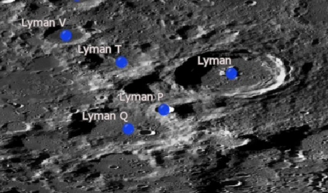 Cráter lunar Lyman. Cráteres satélite. (Imagen LRO)